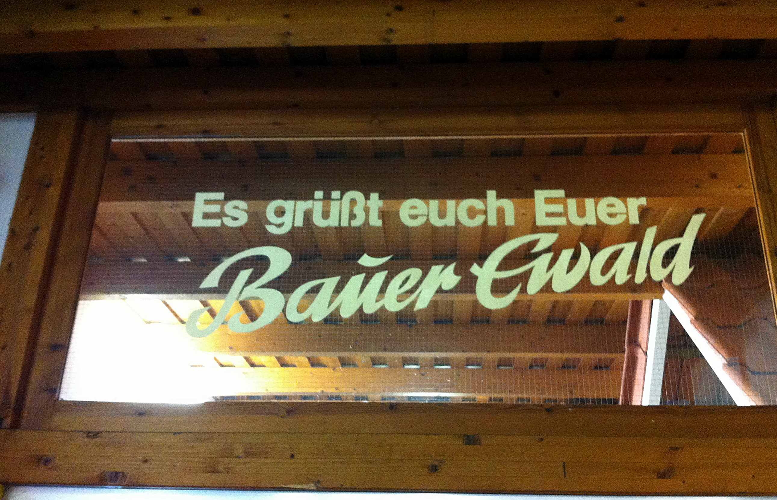 Prickings-Hof in Haltern am See. Aufschrift "Es grüßt euch Euer Bauer Ewald"